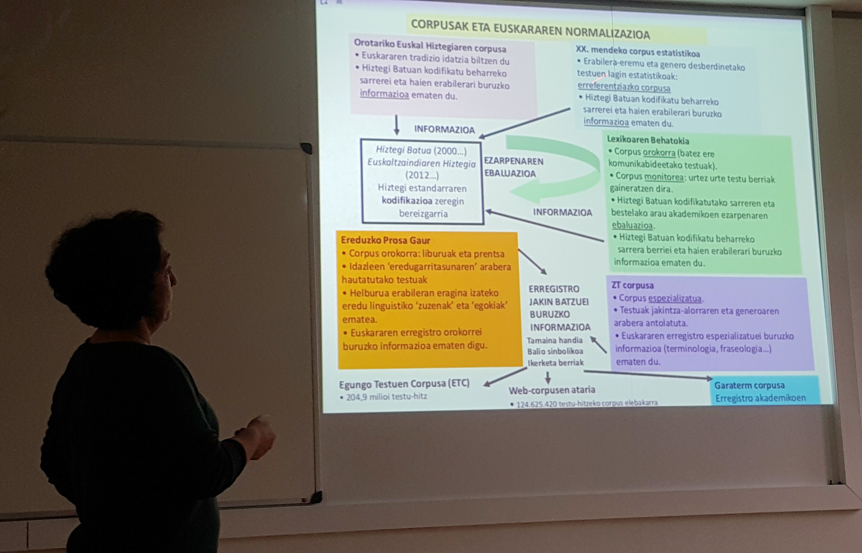 Igone Zabala euskarazko testu corpusak aurkezten (2018)